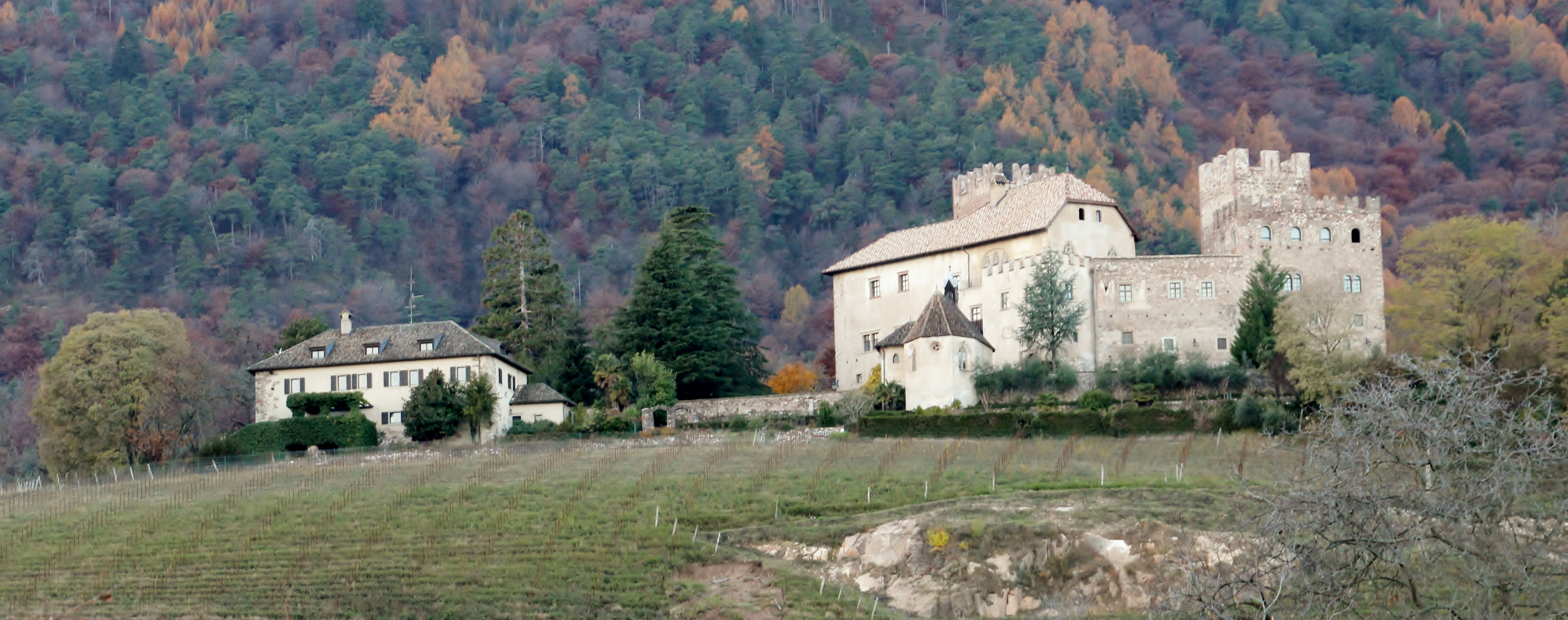 Schloss Freudenstein in Eppan - Burganlage aus dem 13. Jahrhundert, wurde im 16. und 17. Jahrhundert erweitert und umgebaut. Die St.-Andreas-Kapelle wurde 1519 erbaut und 1532 geweiht.